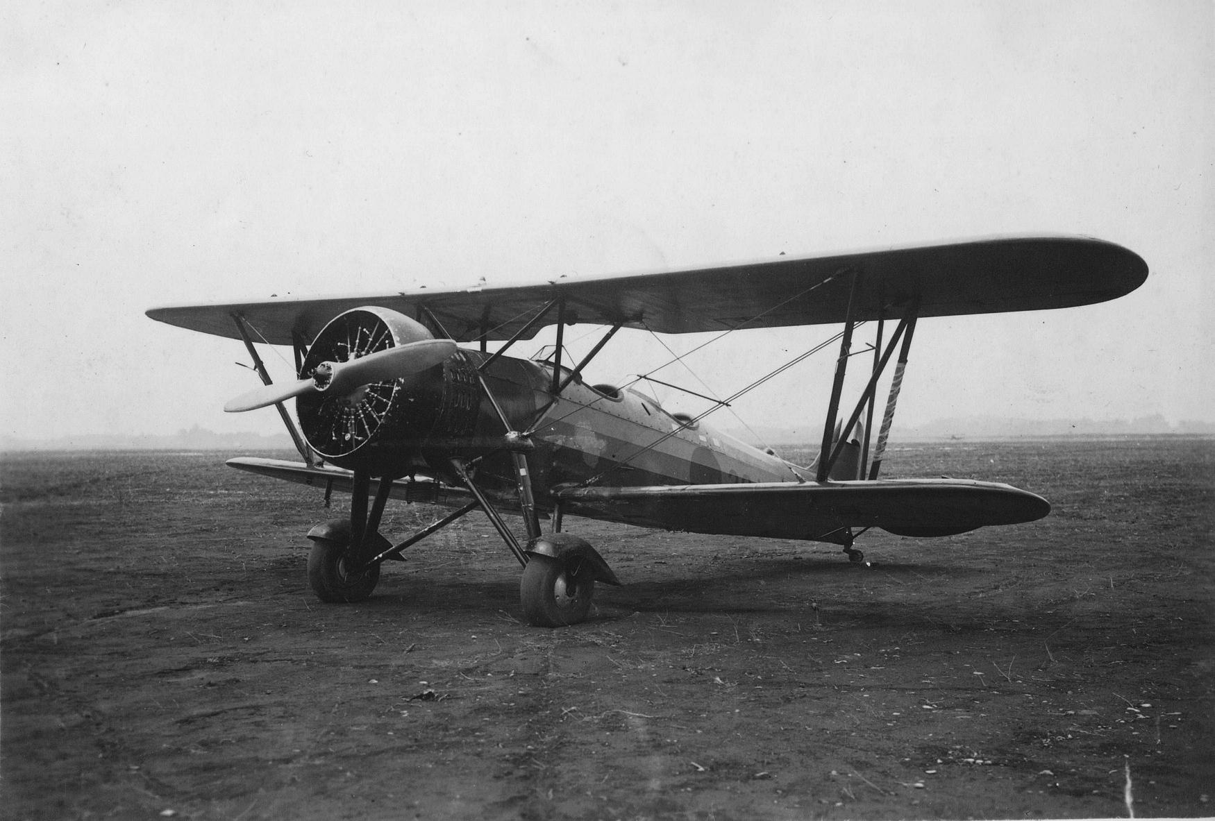 95式1型練習機